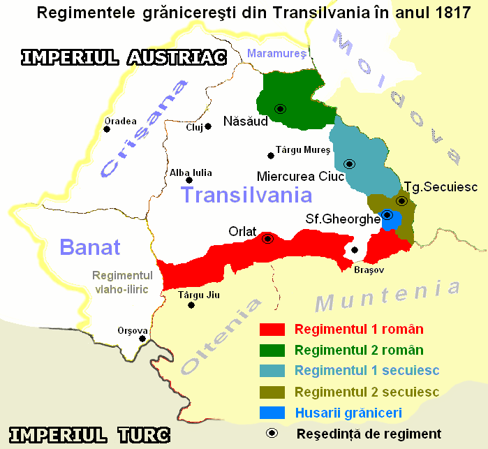 Dispunerea regimentelor grănicereşti în Transilvania în anul 1817.